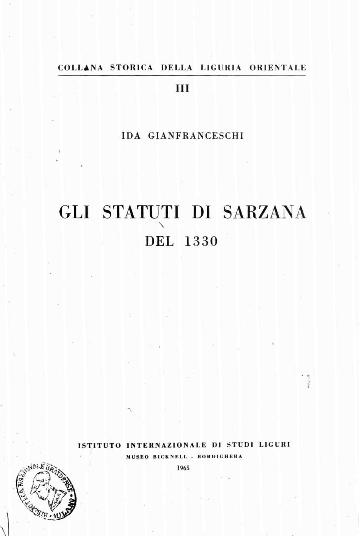 Frontespizio